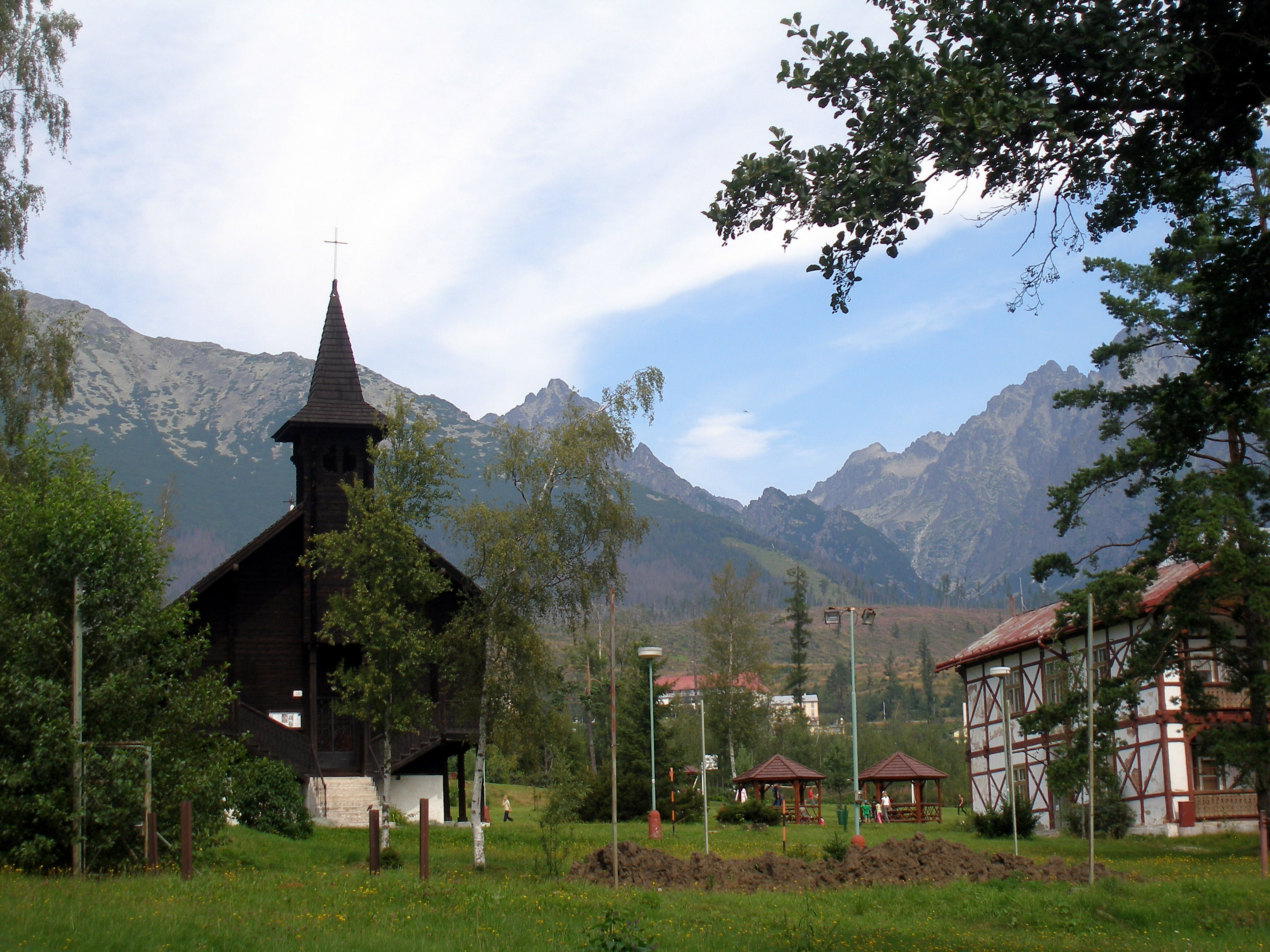 Tatranská osada Dolný Smokovec, mesto Vysoké Tatry, okres Poprad. This medium shows the protected monument with the number 706-1021/0 in the Slovak Republic.